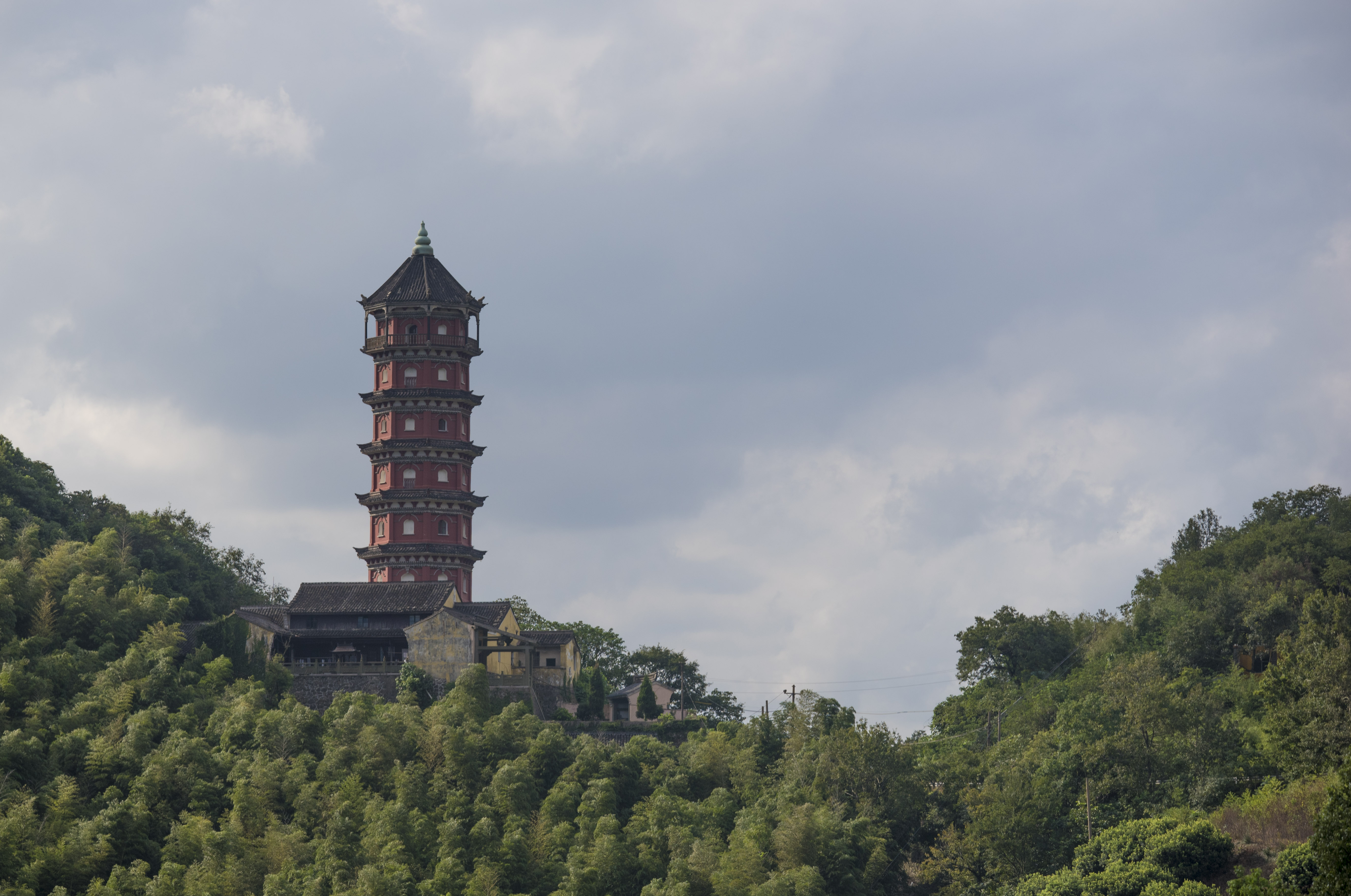 宁波天童小白塔